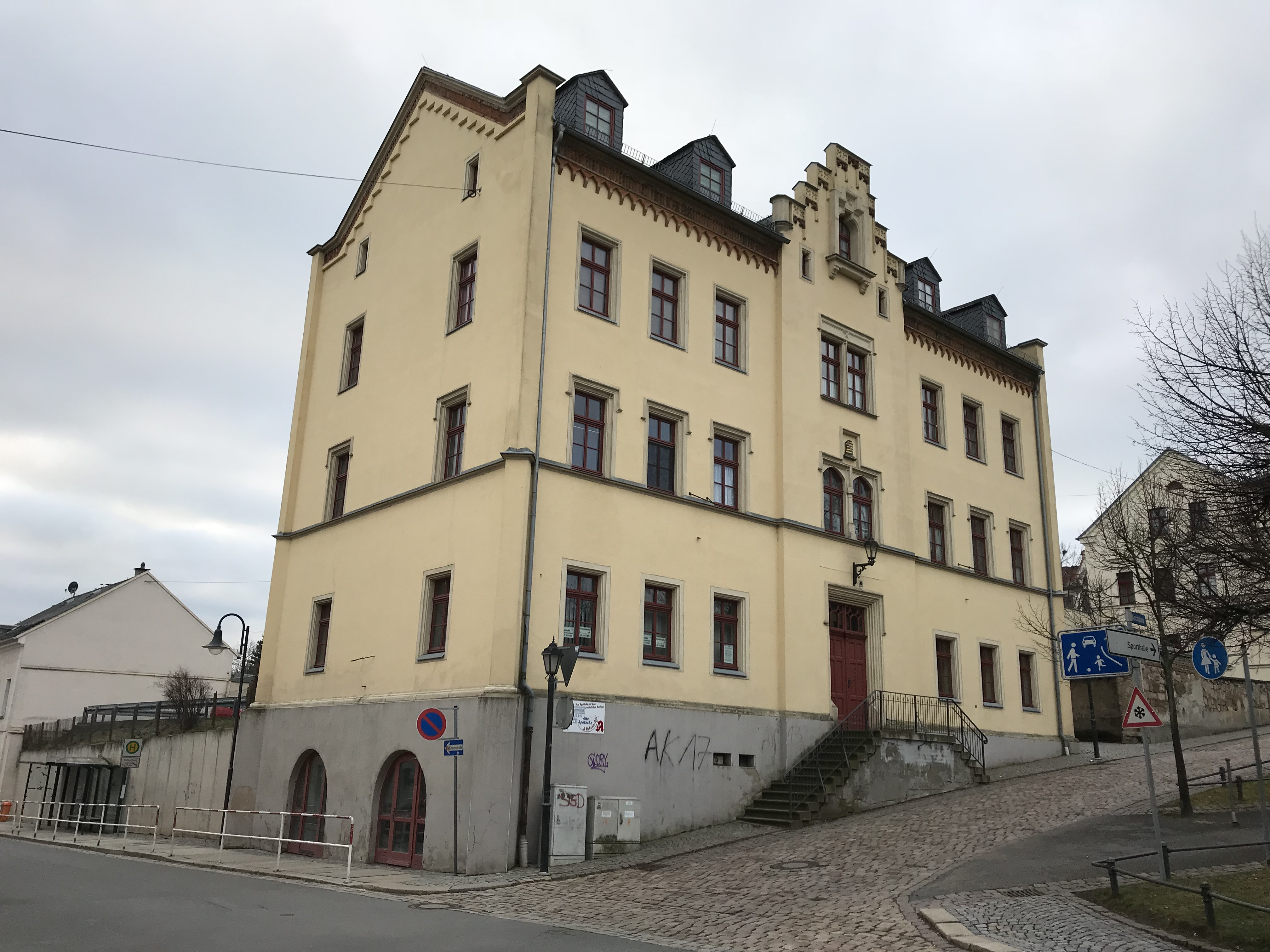 ehemaliges Amtsgericht in Lengenfeld